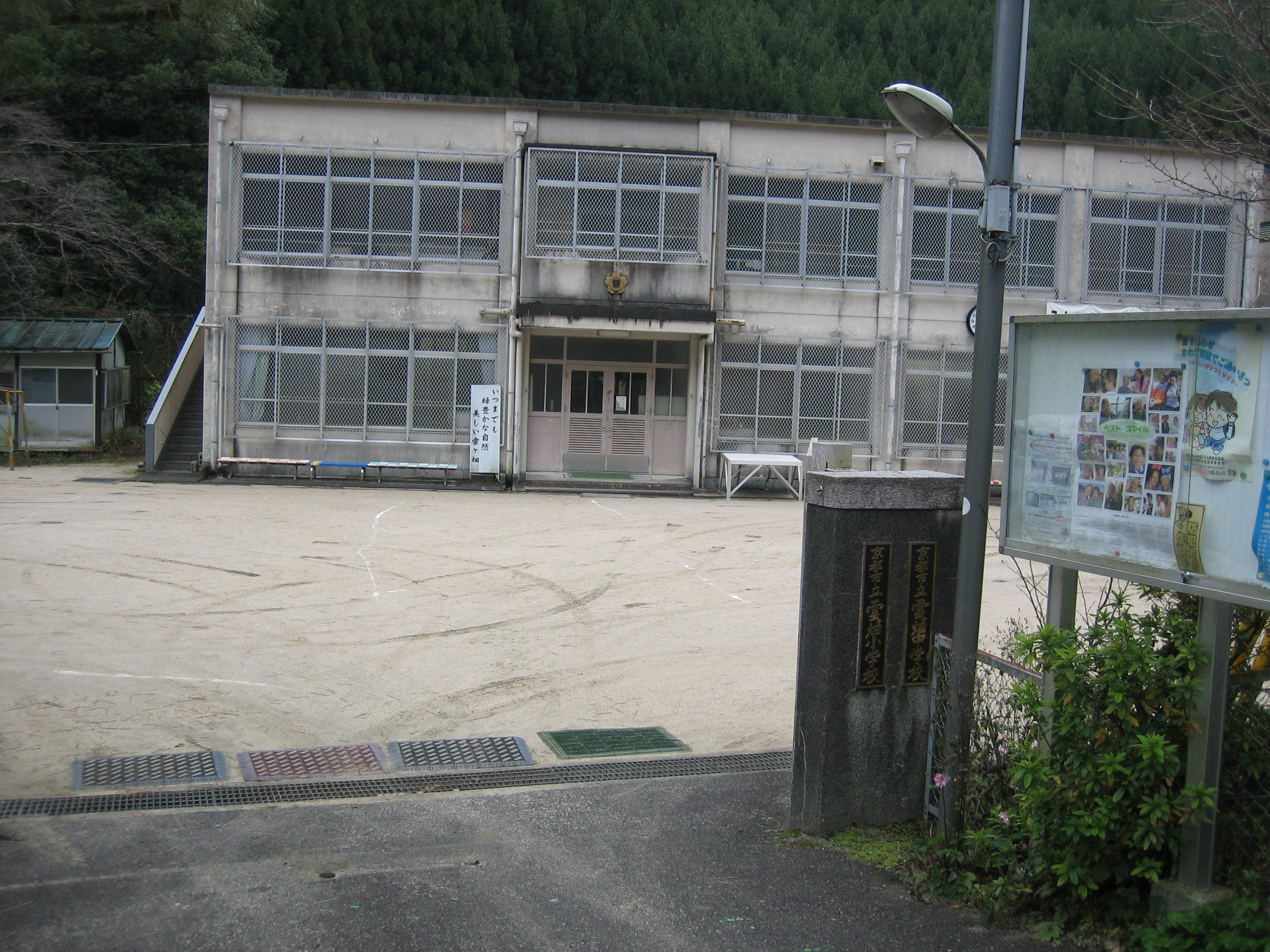 雲ケ畑小・中学校を京都市北区雲ケ畑中畑町から撮影